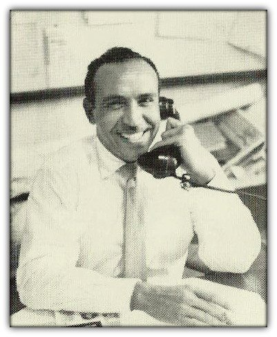 حسين الصافي، مؤسس إذاعة عدن